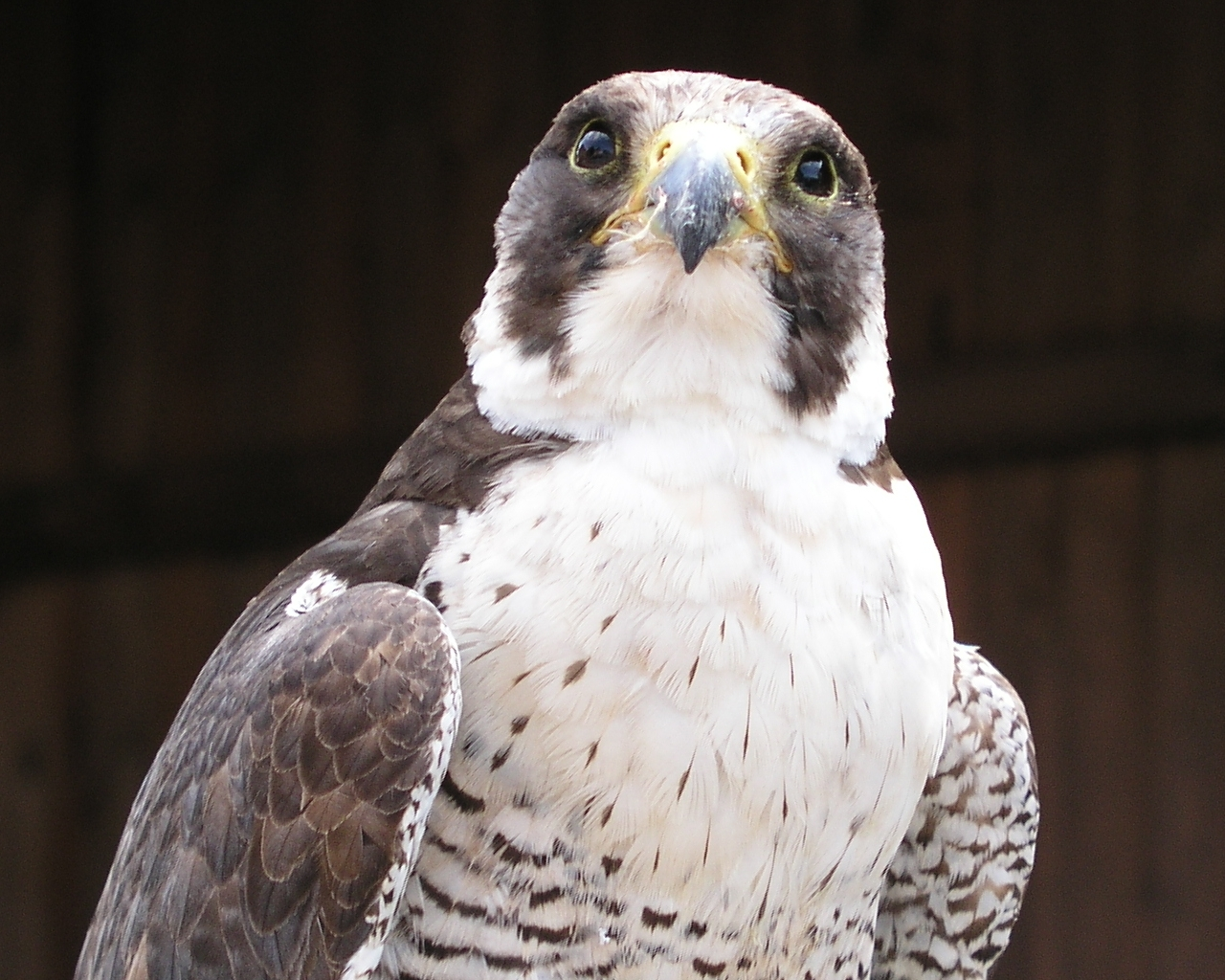 Wanderfalke, Greifvogel, Vögel peregrine falcon, raptor , birds author:silberberg.de soure:own work date: Aug 2003